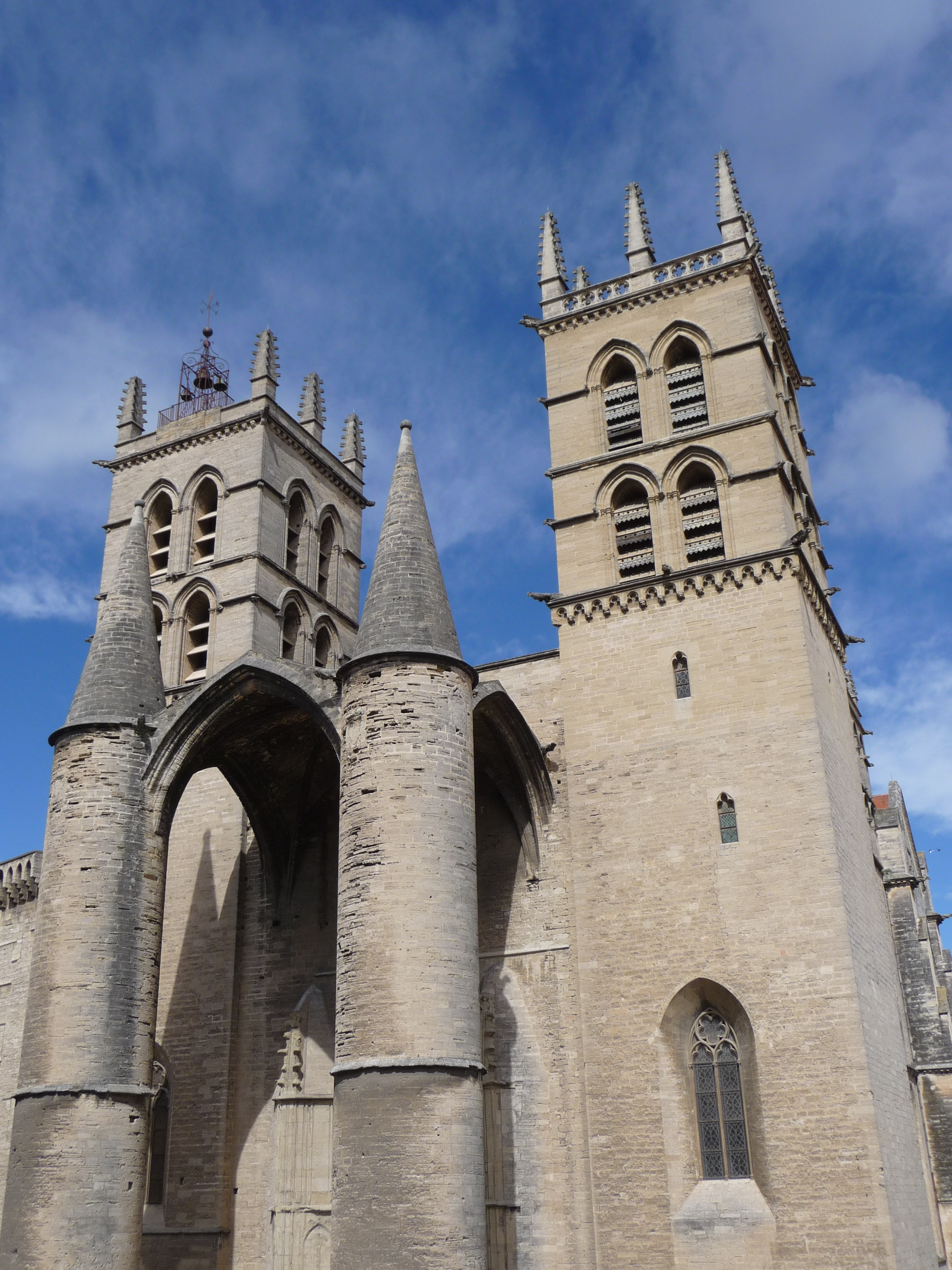 Porta i façana principals de la catedral de Sant Pere (Montpeller)